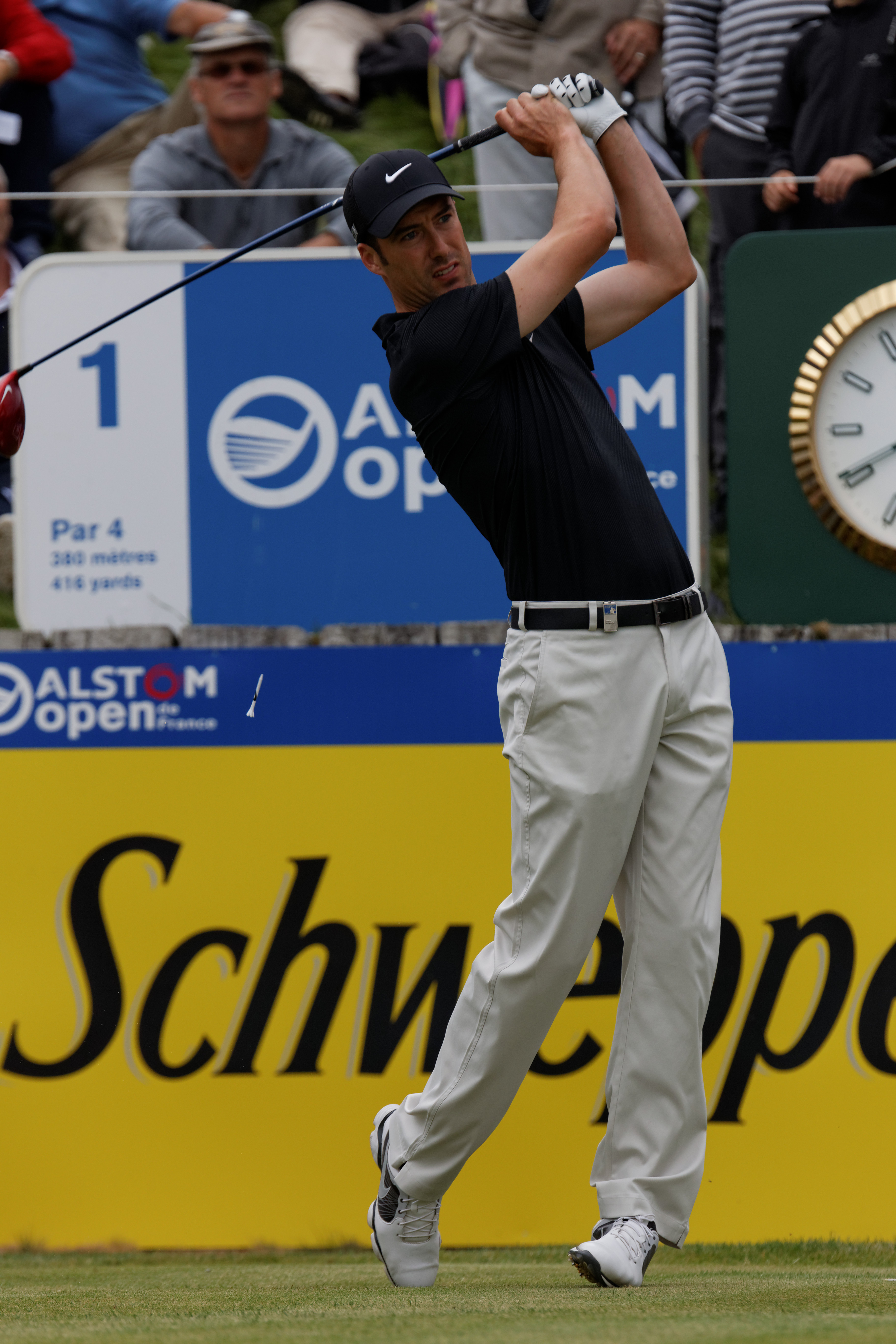 Ross Fisher lors du second tour de l'Open de France 2014 - Golf National - Saint-Quentin-en-Yvelines (78) - départ du trou n° 1